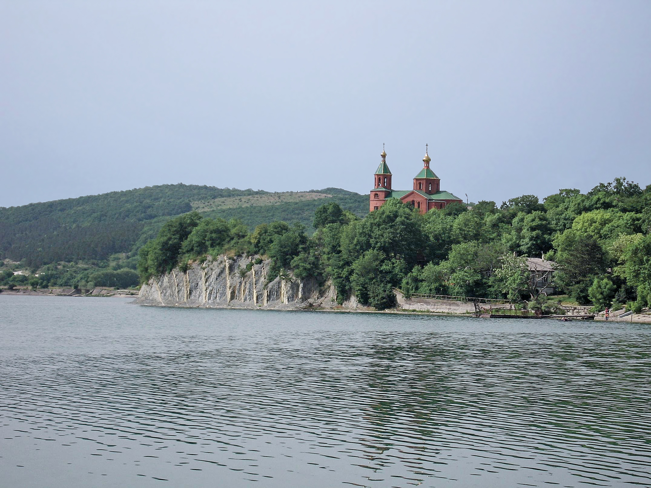 Озеро Абрау: Абрау-Дюрсо, Новороссийск, Краснодарский край This image is related to the protected area of Russia number 2320257